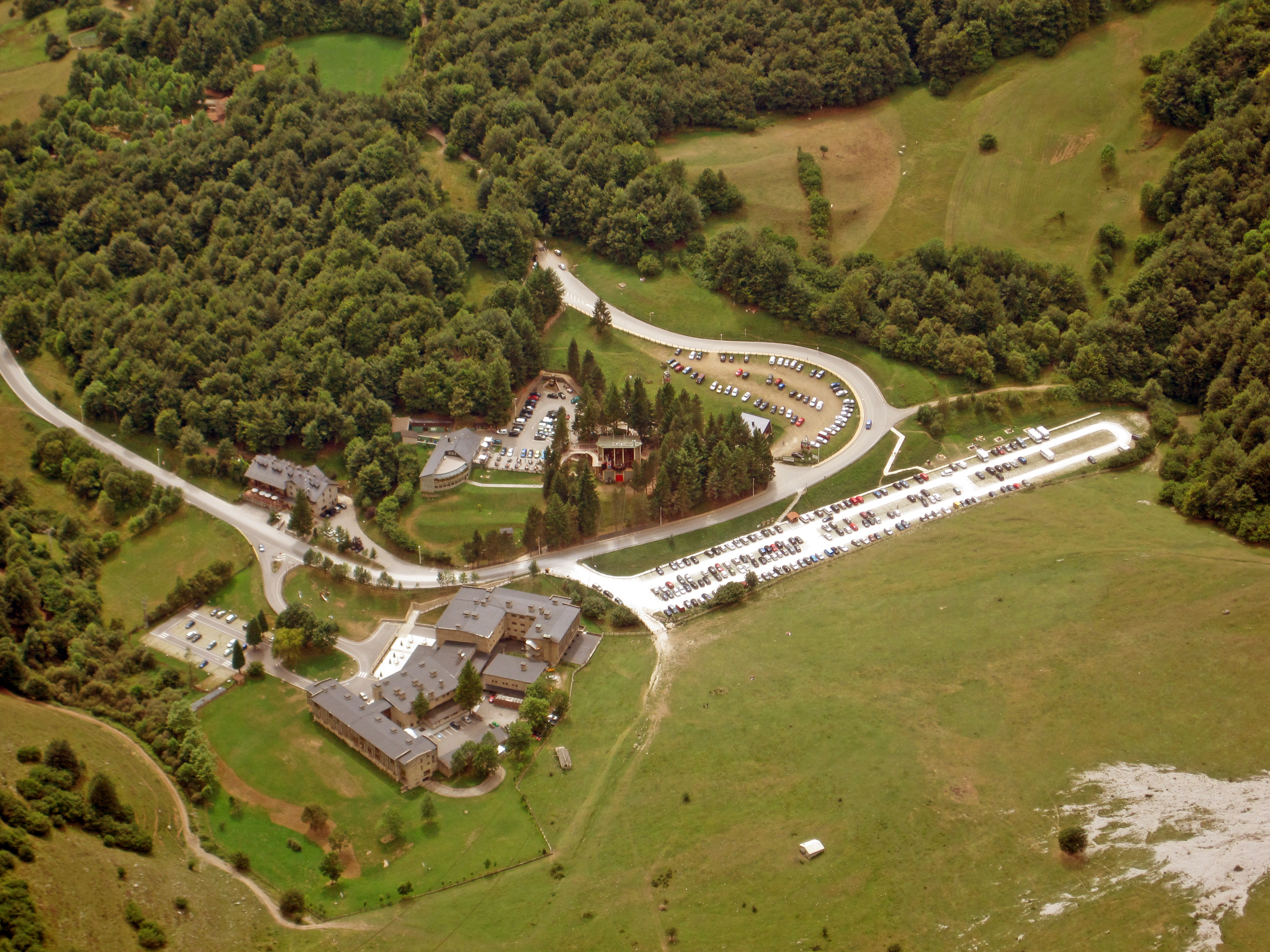 Vista aérea de Fuente Dé (Camaleño, Cantabria, España).